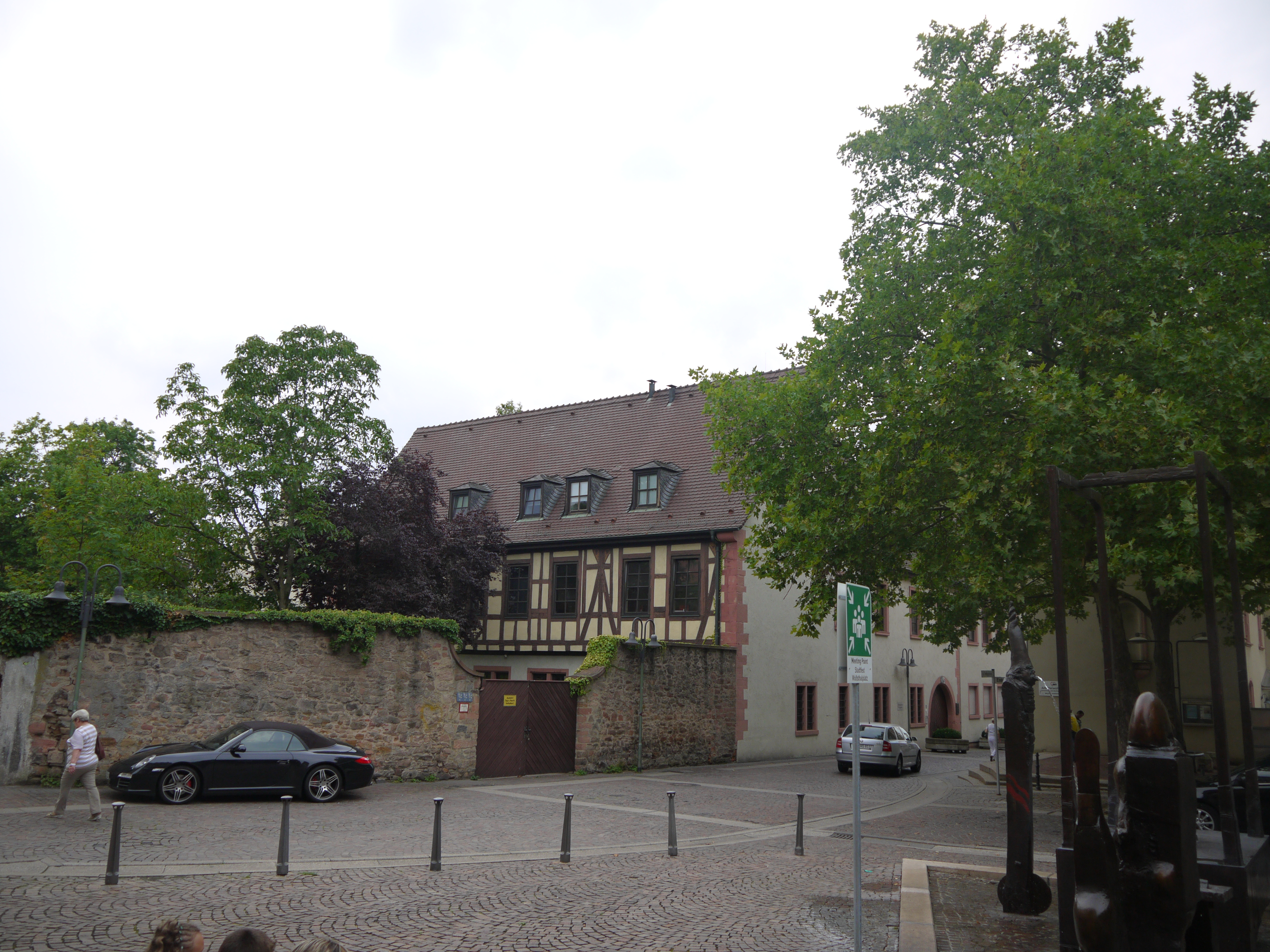 Treibgasse 7, denkmalgeschütztes Gebäude (Ingelheimer Hof) in Aschaffenburg